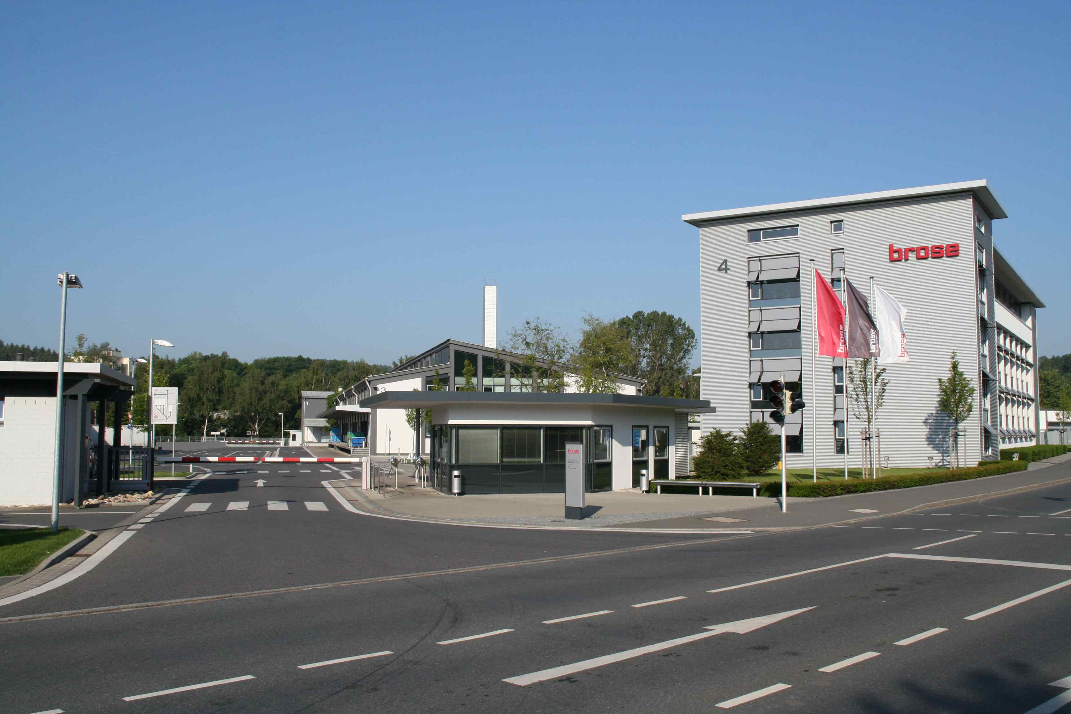 Firma Brose in CoburgEinfahrt Werk 2 Bamberger Straße